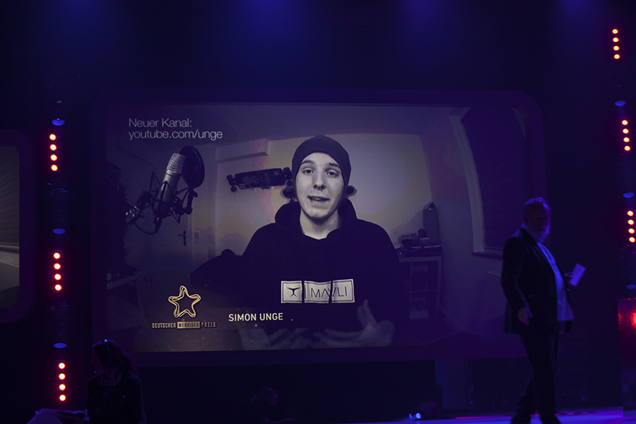 Simon Wiefels, nominiert beim deutschen Webvideopreis 2015.